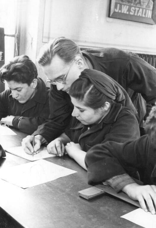 Leipzig, Auszubildende aus Griechenland Illus Illner 5.3.51 Junge Griechen werden in der DDR zu Facharbeitern ausgebildet. Im LBH-Ausbildungswerk, Leipzig, haben Kinder griechischer Freiheitskämpfer gute Aufnahme gefunden. Zusammen mit ihren deutschen Freunden werden sie in den verschiedensten technischen Berufen ausgebildet und erhalten Unterricht in der deutschen und grichischen Sprache. Aktiv setzen sich für den Freudenskampf in der Deutschen Demokratischen Republik ein. Sie bildeten ein Friedenskomitee und schufen eine enge Zusammenarbeit zwischen der FDJ und dem griechischen Jugendverband Epon. UBz: Der Ausbilder Fritz Ludewig erteilt dem griechischen Lehrling Georgia Kumari deutschen Schreibuntericht.